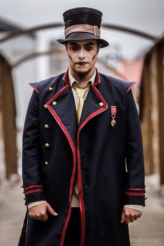 Foto de divulgação do Clipe O Sol e a Peneira